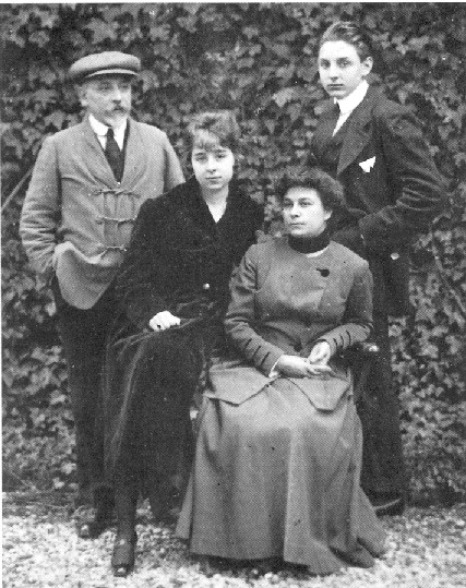 Luigi, Antonietta, Lietta e Fausto in una fotografia che fu inviata al figlio di Pirandello (che era sottotenente), prigioniero a Mauthausen.